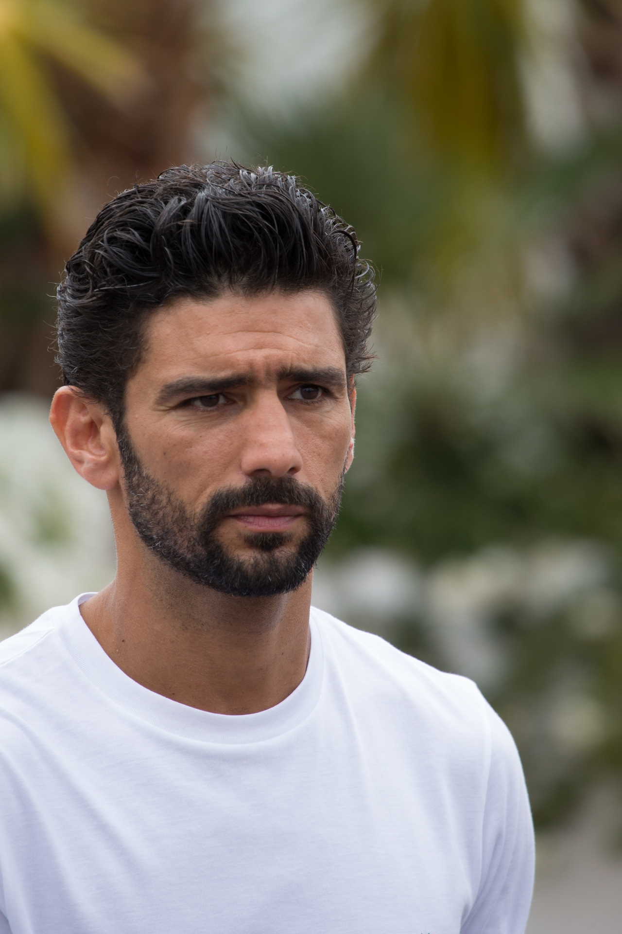 Salim Kechiouche à Cannes en 2019.